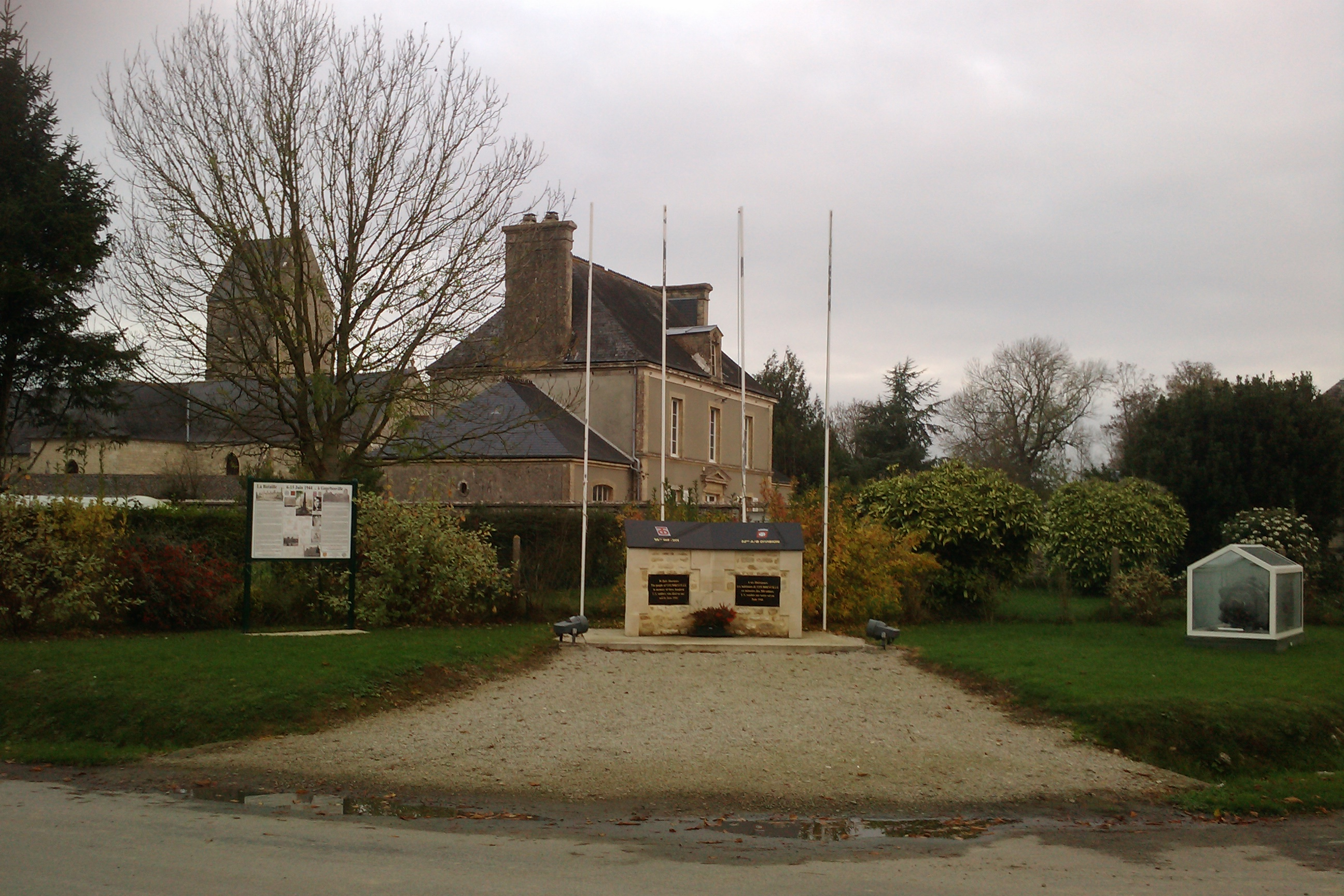 Monument 90e Division d'infanterie et 82e Division aéroportée à la mémoire des trois-cent soldats américains de la 90th US Infantry Division et de la 82nd US Airborne Division, qui sont tombés pour la libération du bourg en juin